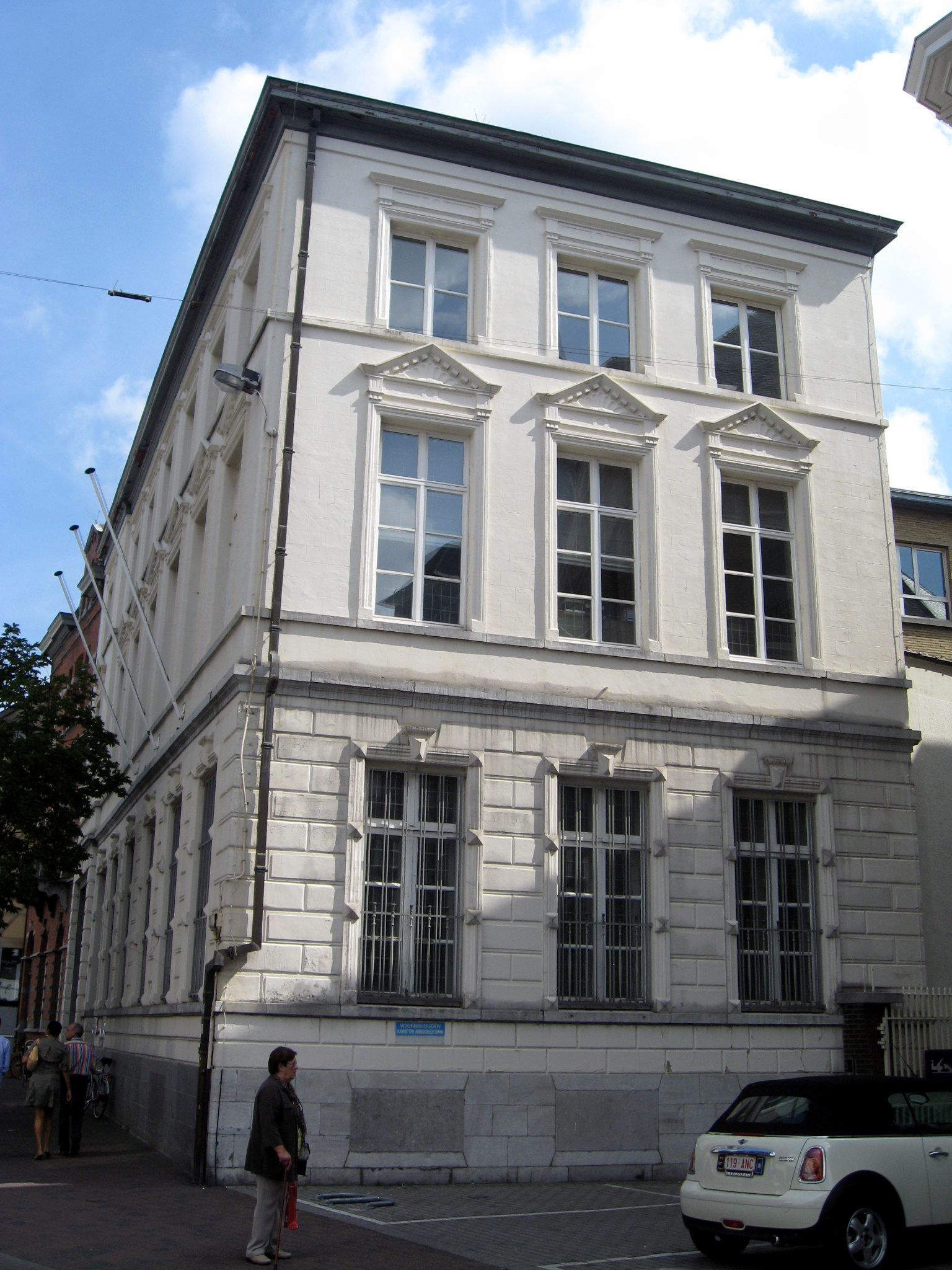 Handelsrechtbank, neoclassicistisch herenhuis in Hasselt